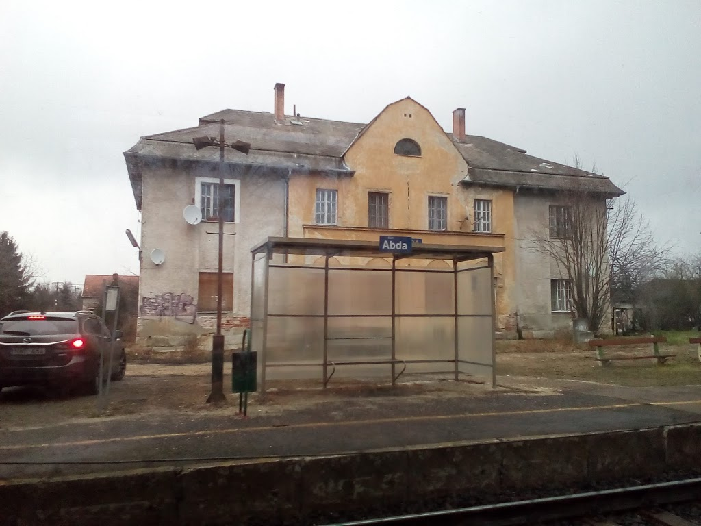 Abda vasútállomás